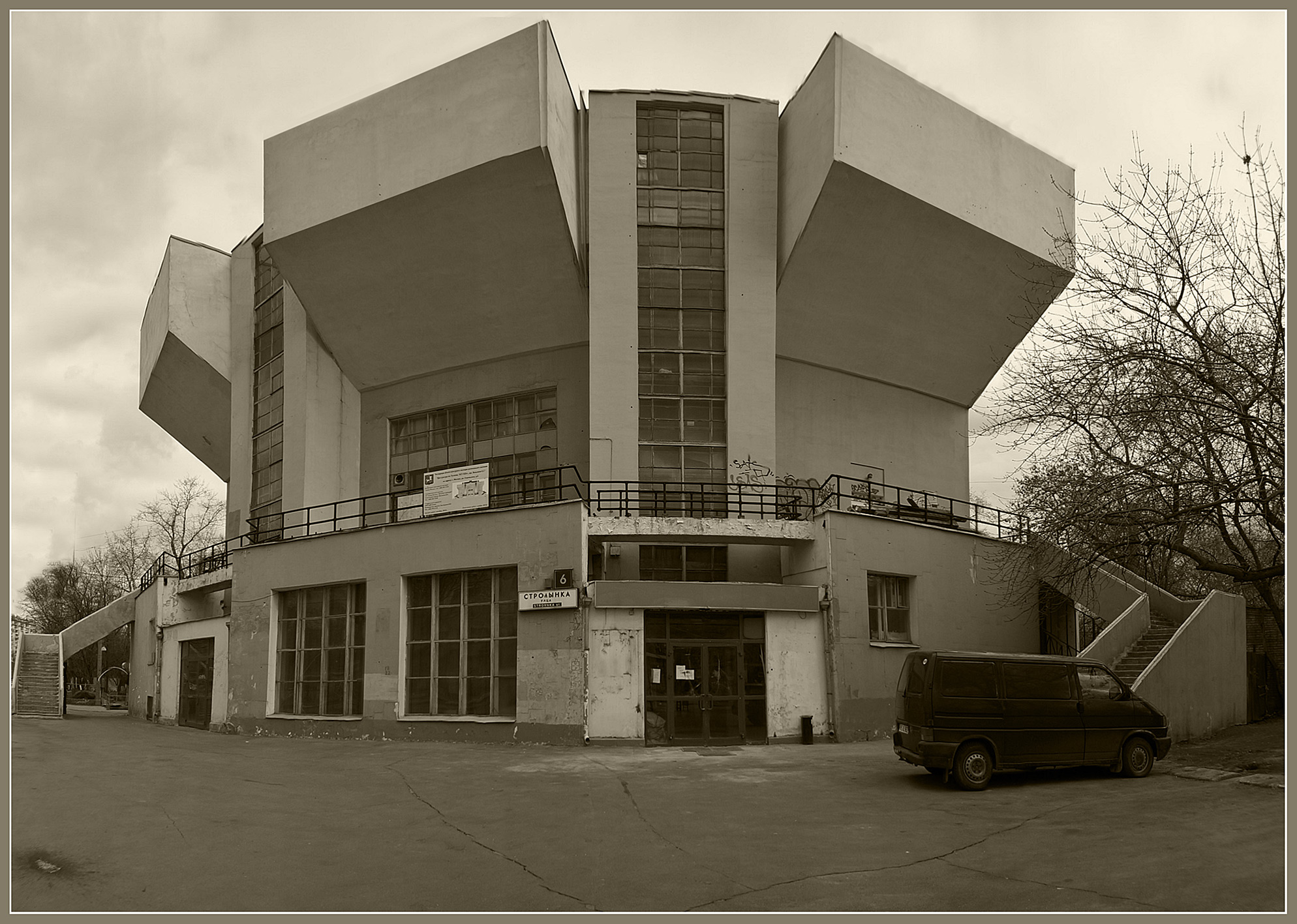 Дом культуры им. Русакова (Москва и Московская область, Москва, Стромынская площадь, 10)